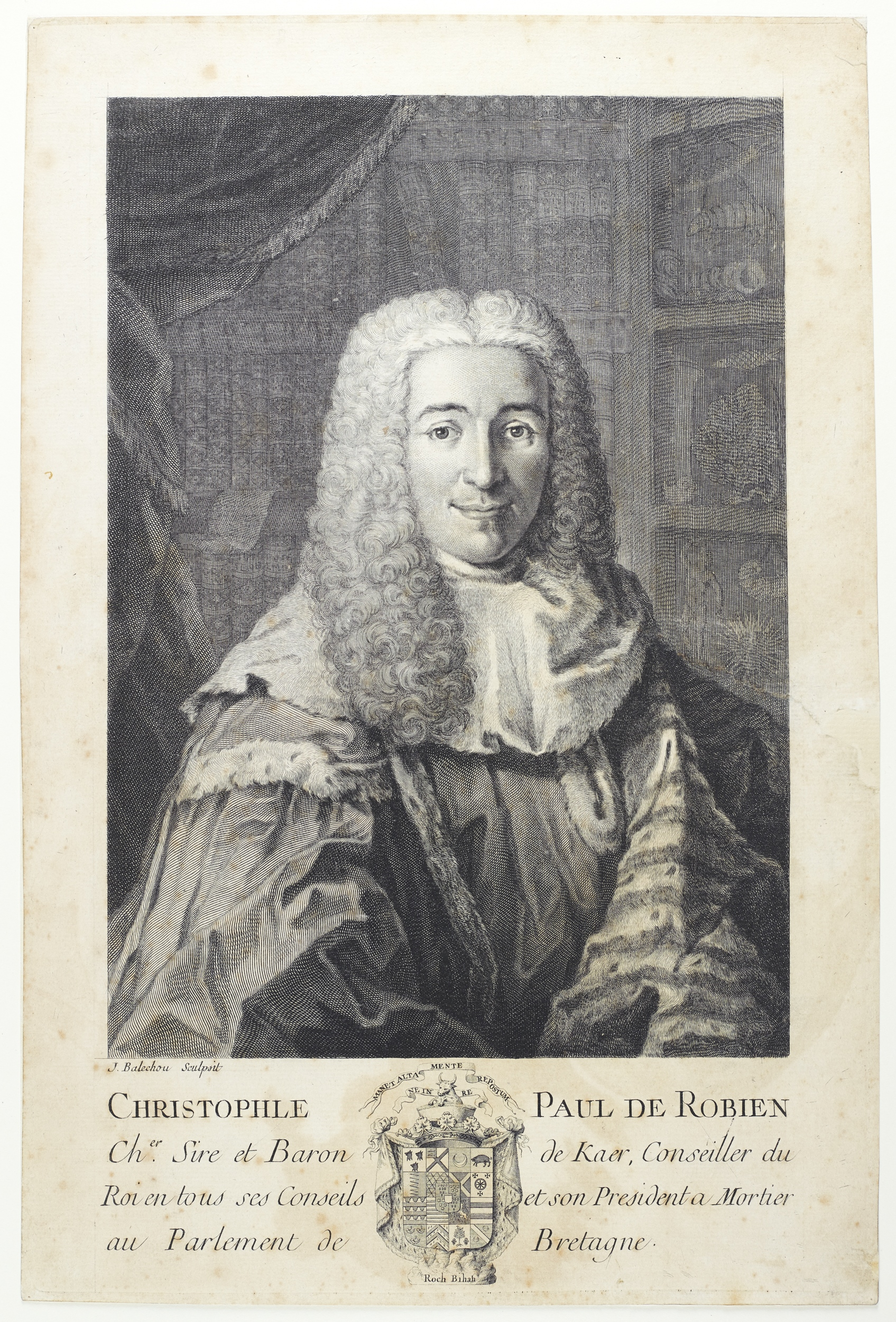 Portrait